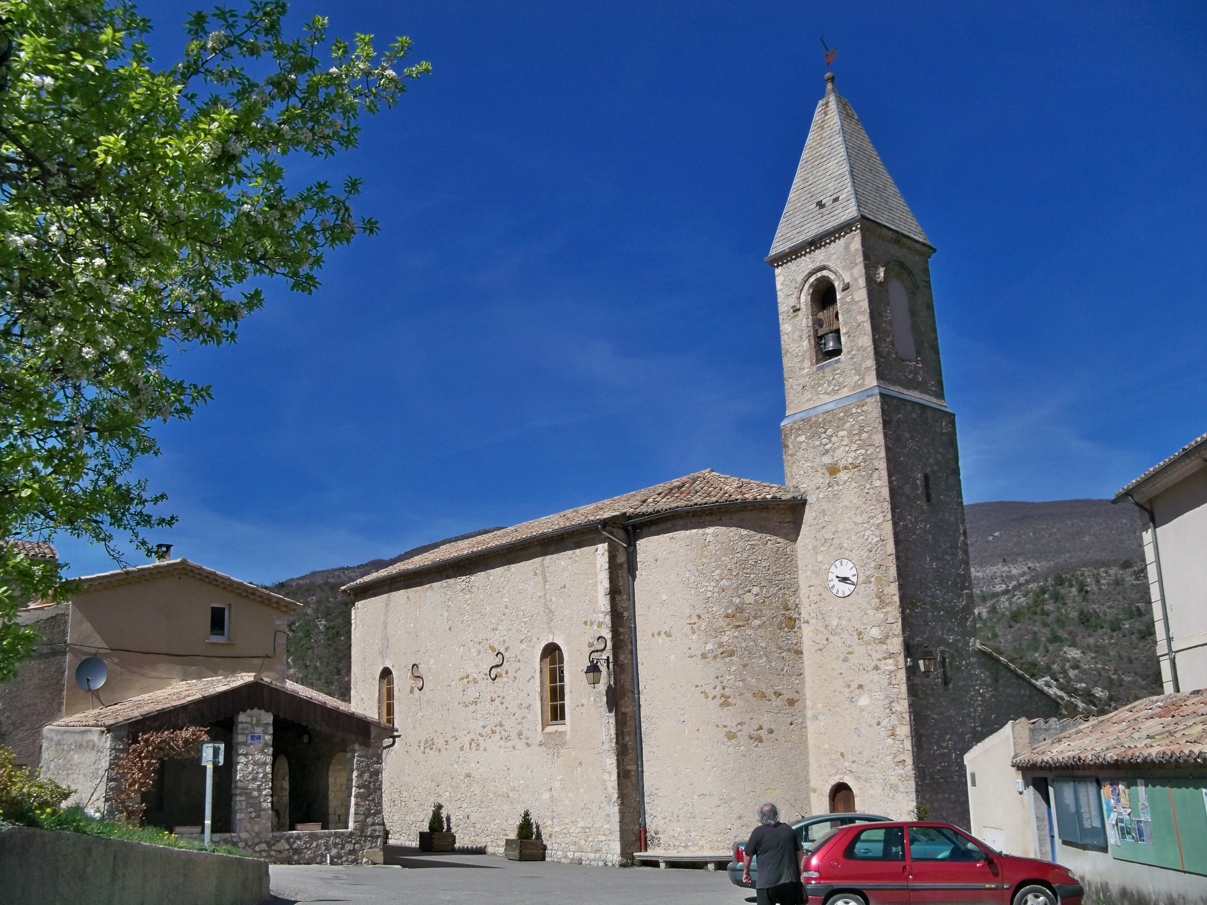 église de Savoillan (84)